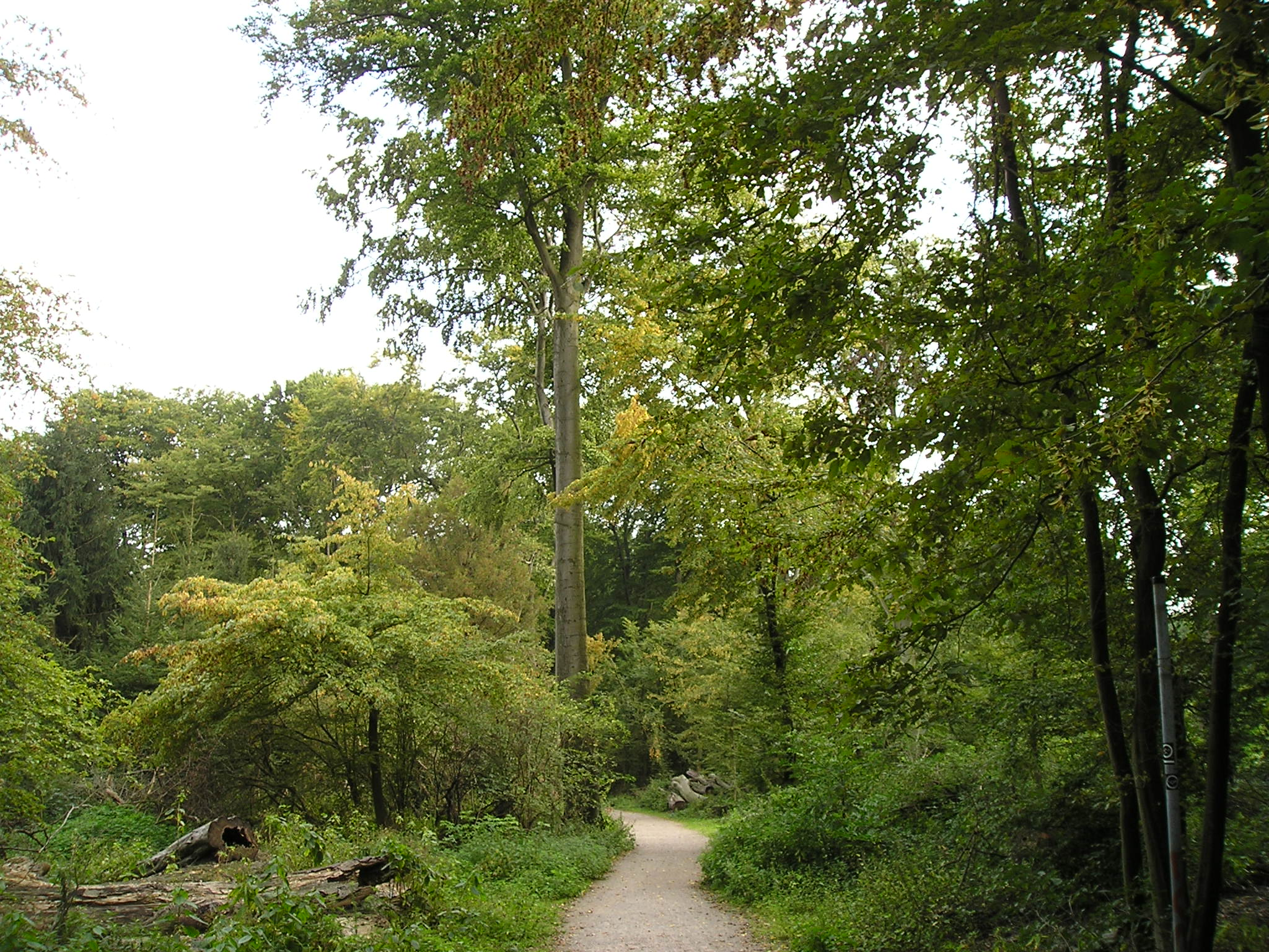 Knipprather Wald in Monheim am Rhein